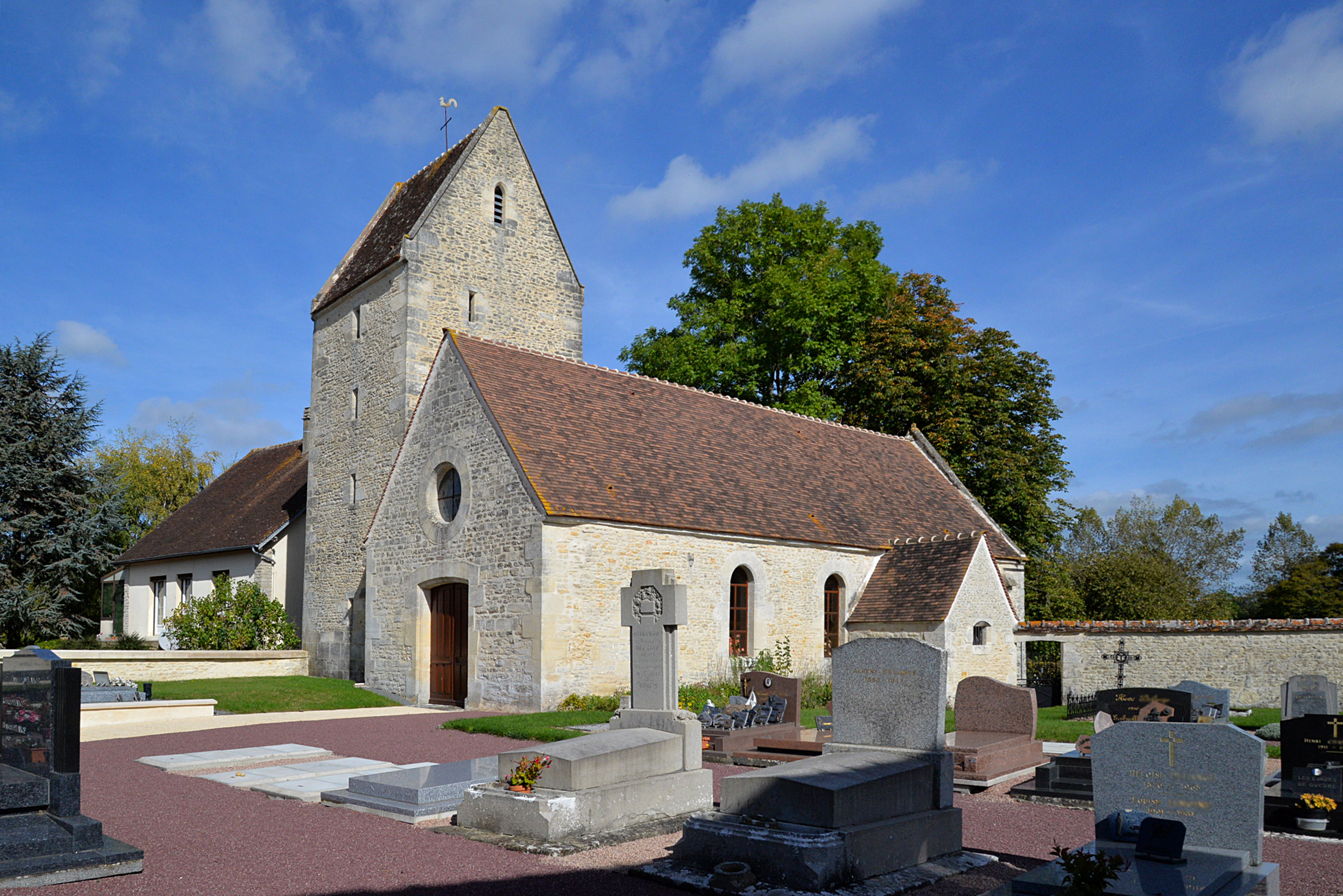 Juvigny-sur-Orne (Orne)